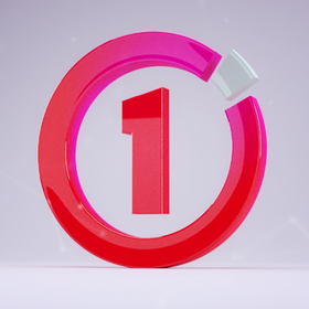 شعار قناة